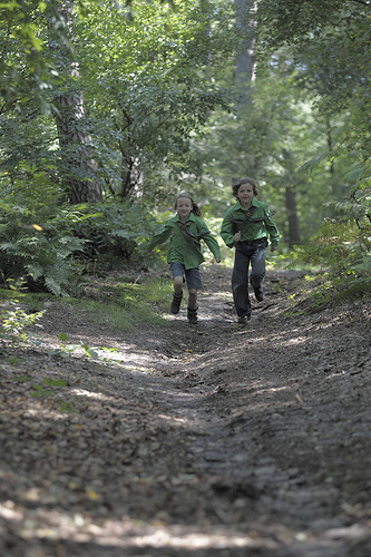 Twee welpen van scouting rennen door het bos